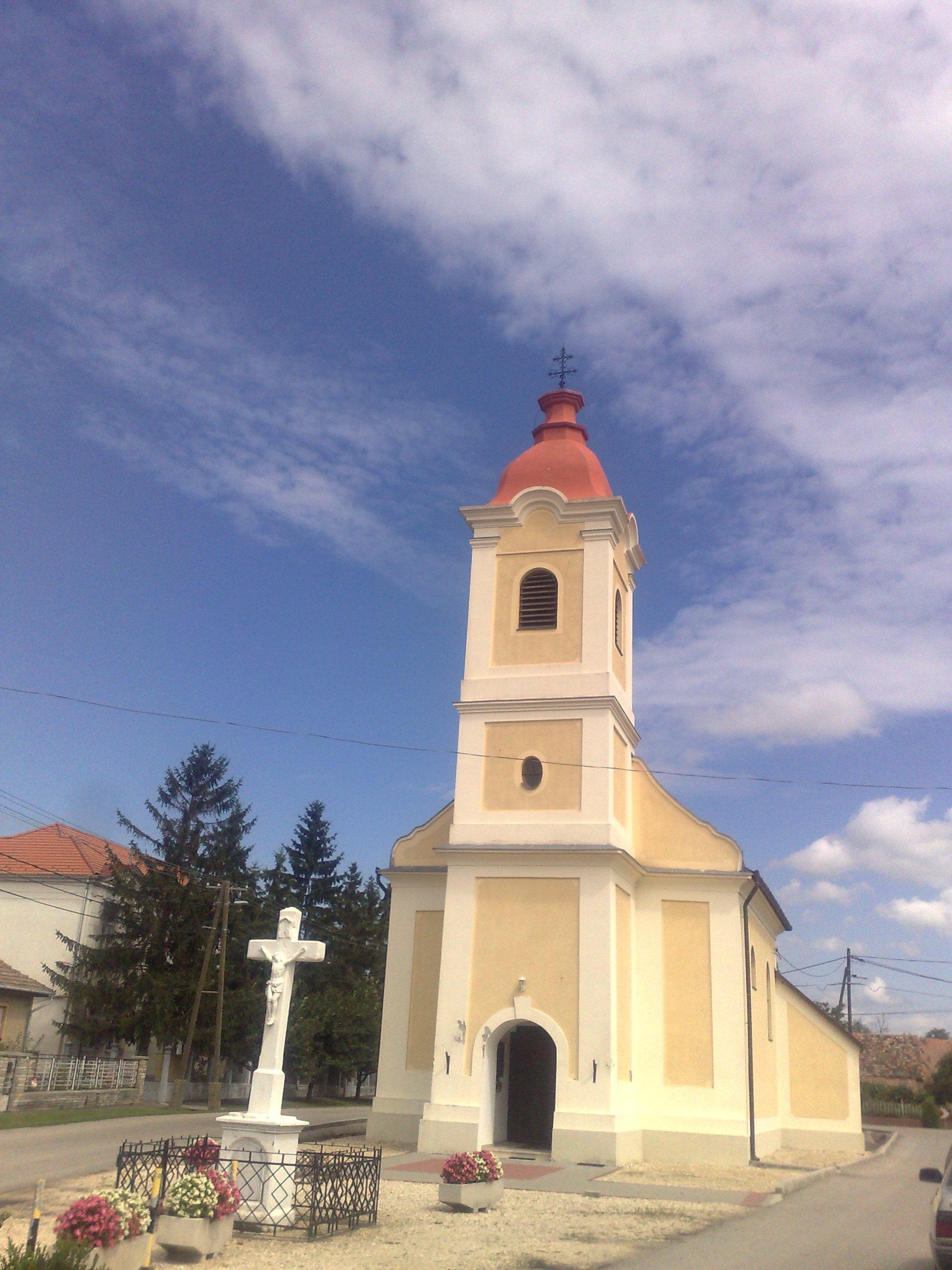 Pásztori - római katolikus templom